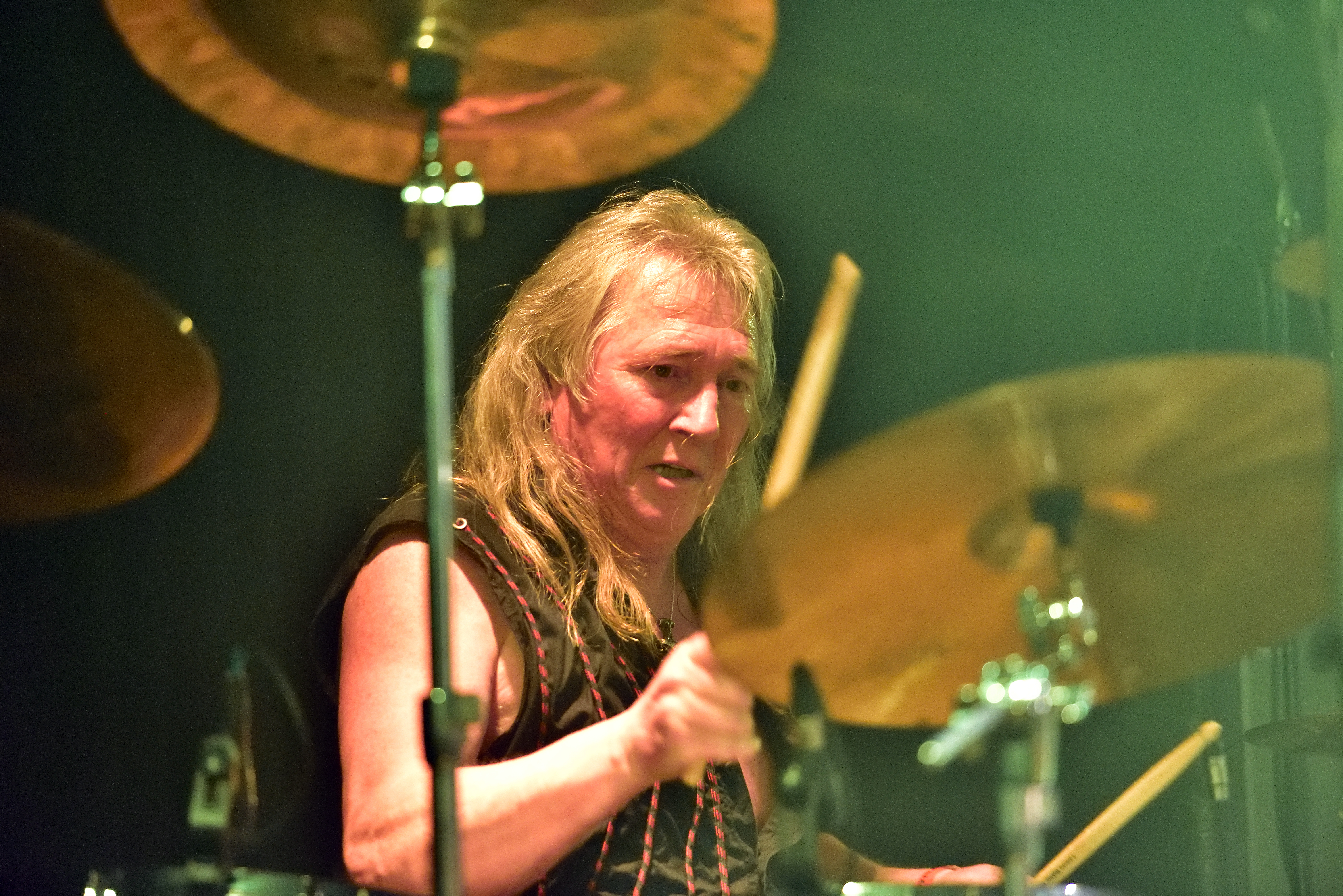 Picture beim Heathen Rock Festival